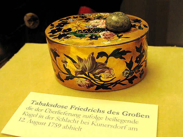 Tabakdose des Alten Fritz mit Gewehrkugel